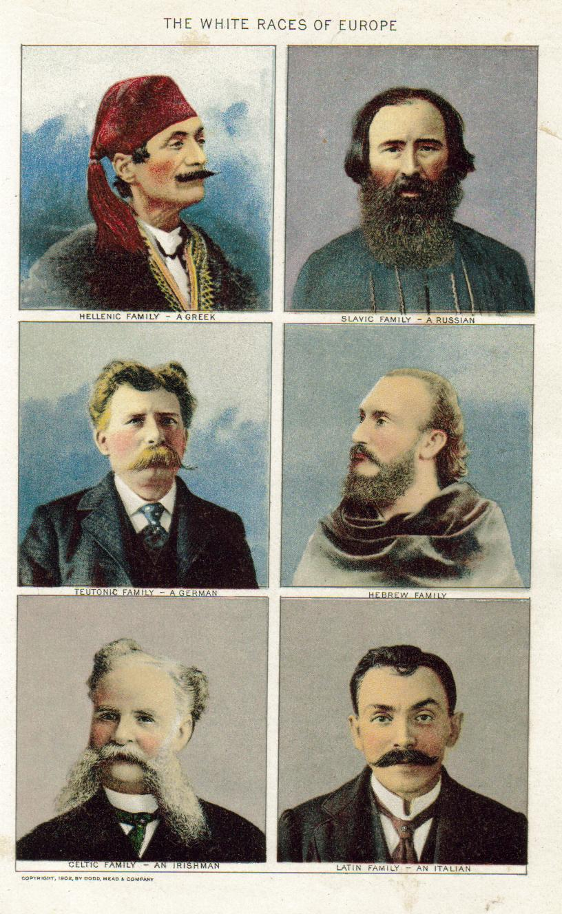 Painting